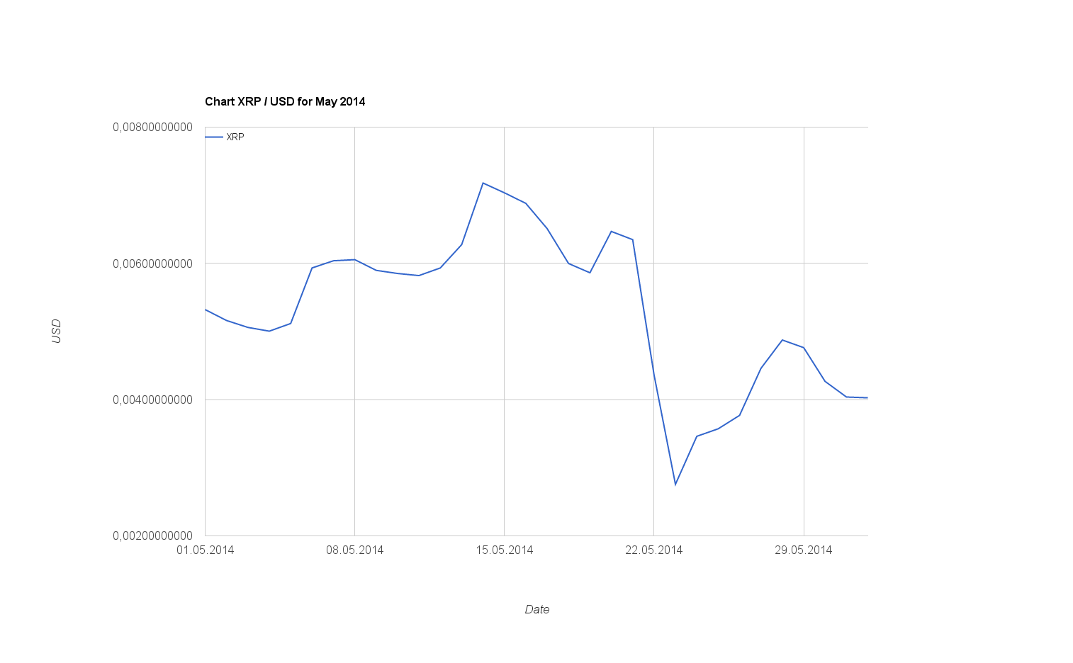 Диаграмма валютной пары XRP/USD за май 2014 года на бирже Bitstamp (данные для графика с сайта )